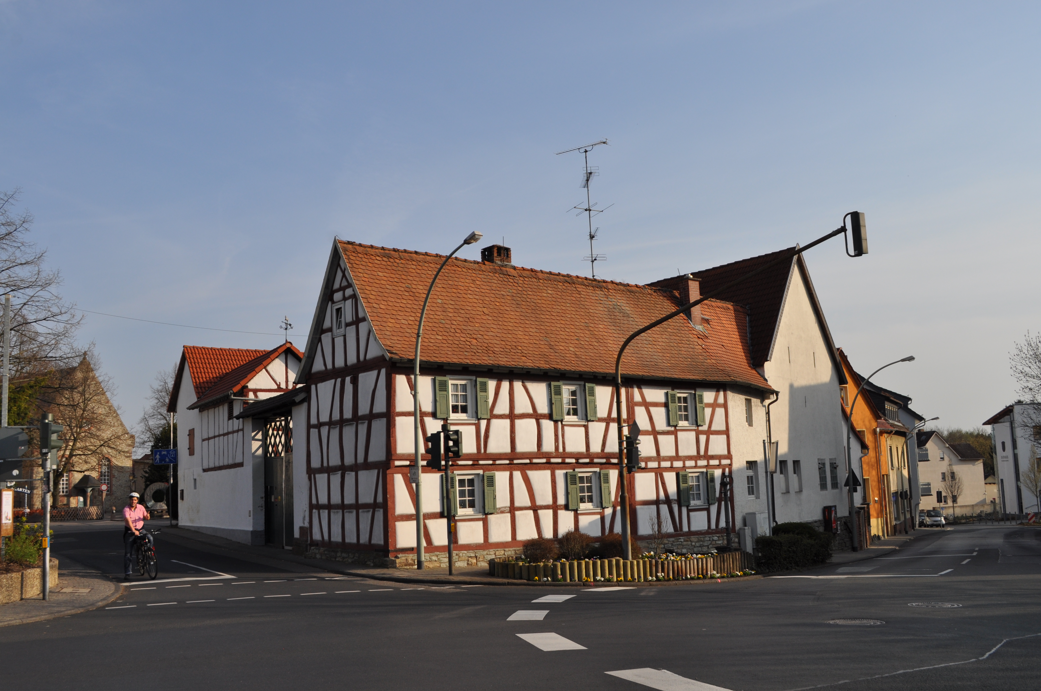 Sulzbach (Taunus), An der Linde 9